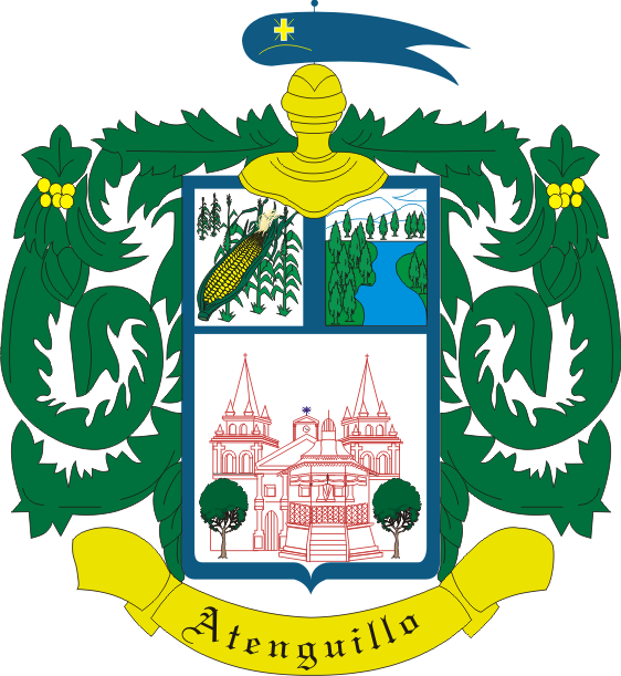 Escudo Oficial de Atenguillo